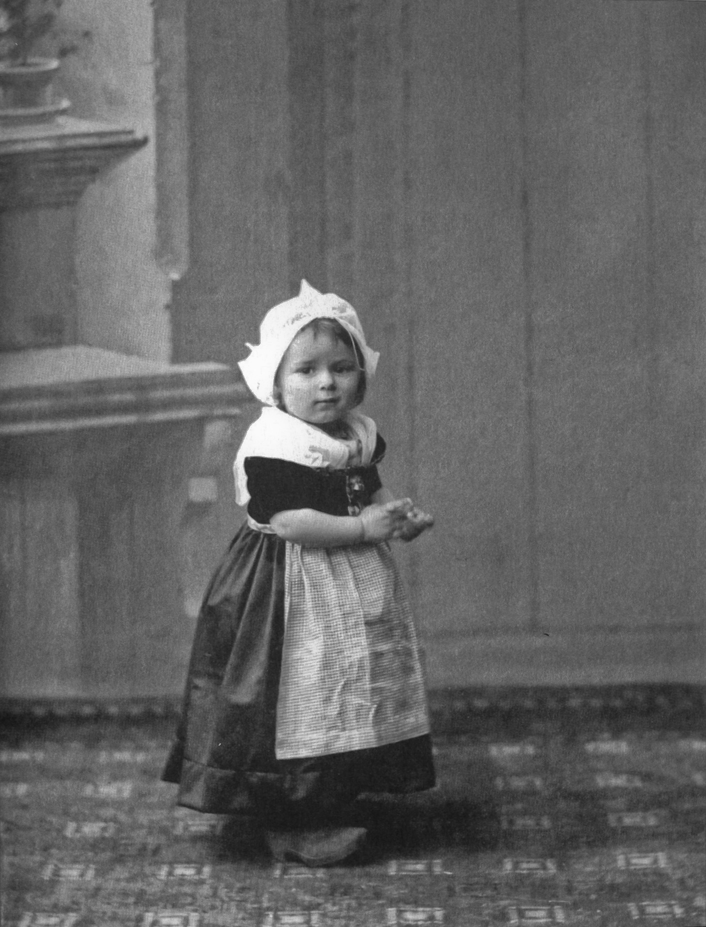 Ariadna (Sara) Scriabine-Knout (Sarah Fixman, "Regine") in Amsterdam